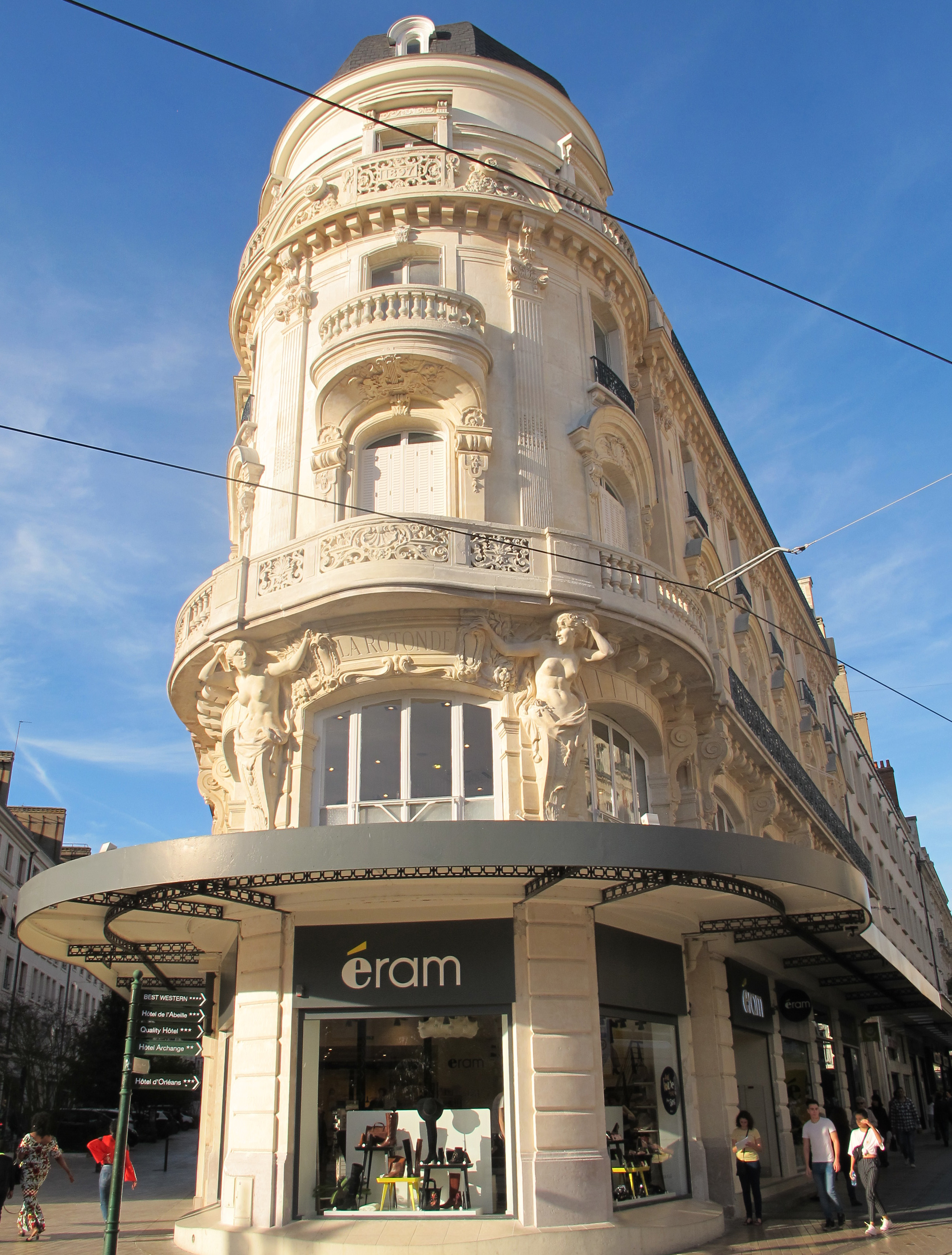 Immeuble La Rotonde, place du Martroi, Orléans-, France